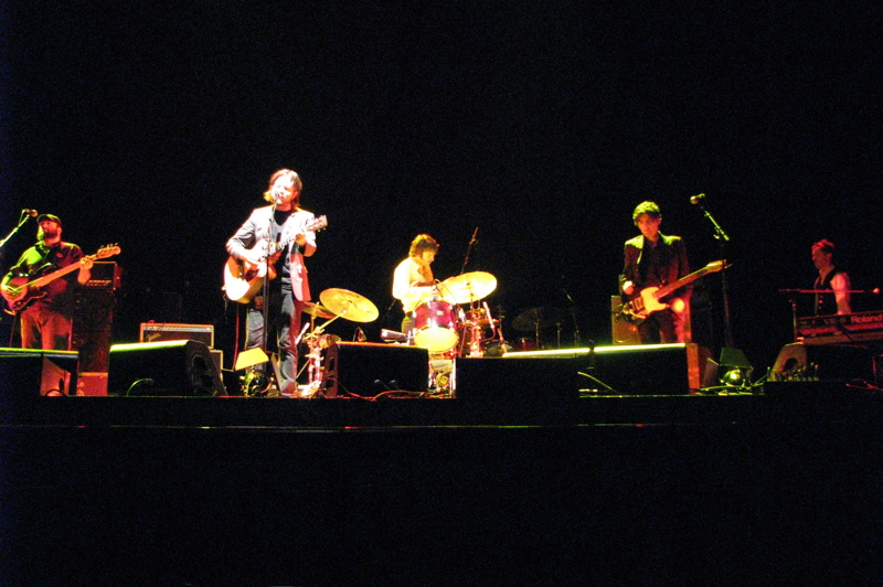 Augie March in Melbourne